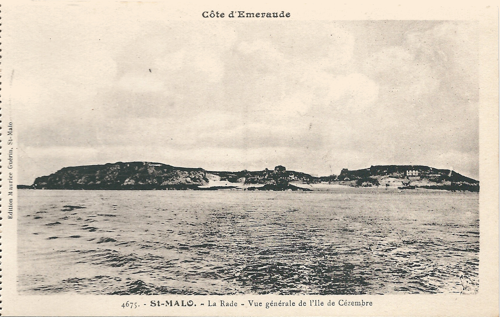 Le Côte d’Émeraude (Bretagne, France) ; vers 1920